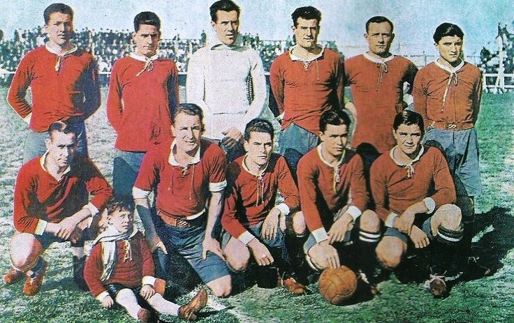 plantel de Independiente 1926